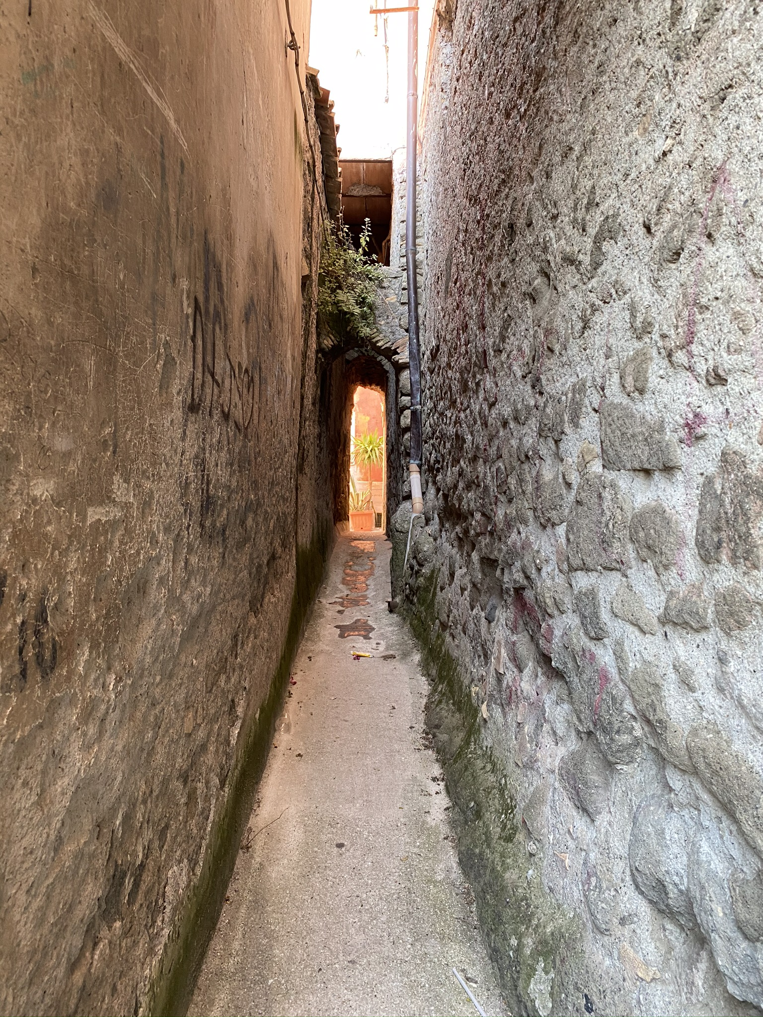 Vicolo Baciadonne a Marino